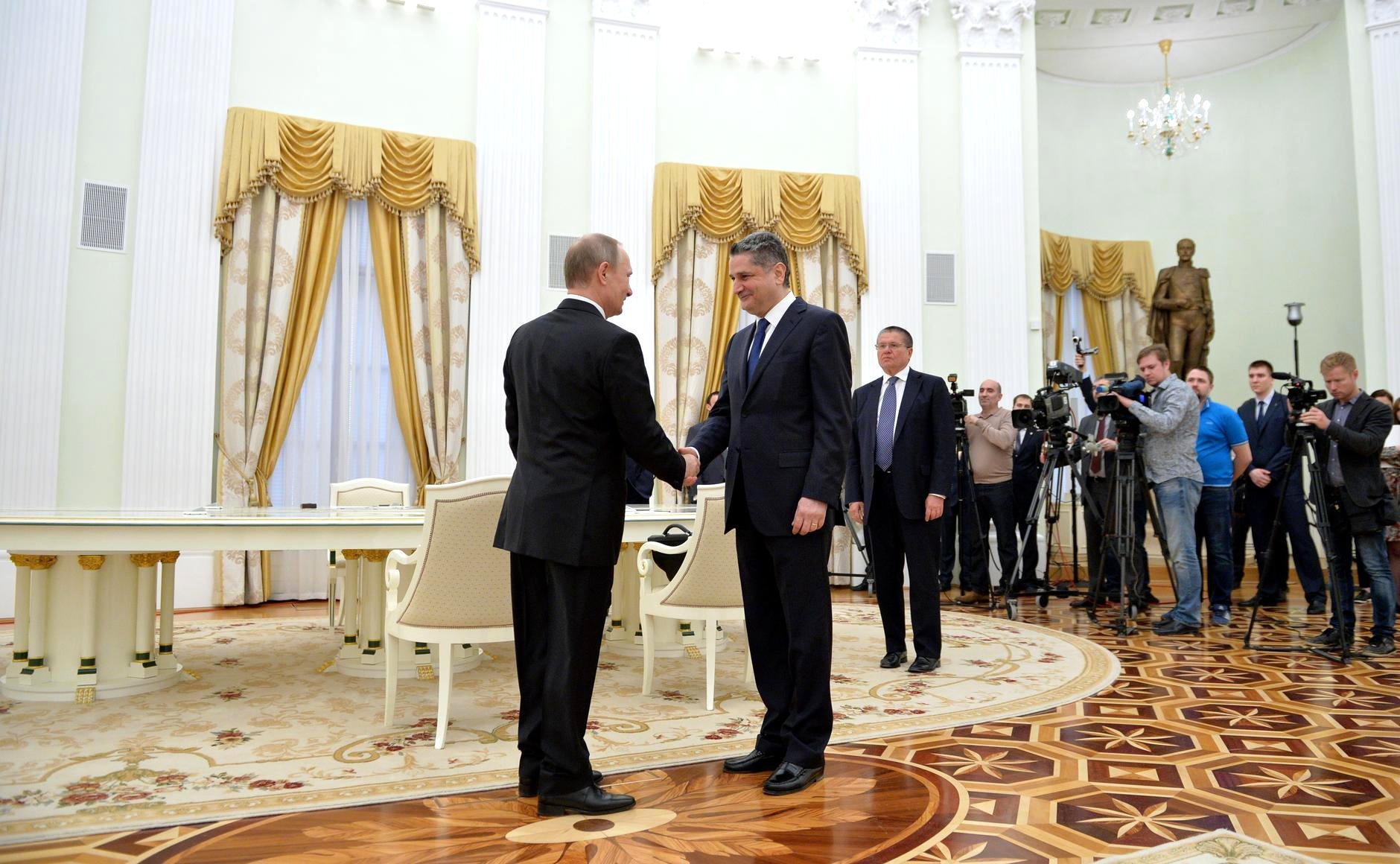 Президент России Владимир Путин с Председателем Коллегии Евразийской экономической комиссии Тиграном Саркисяном